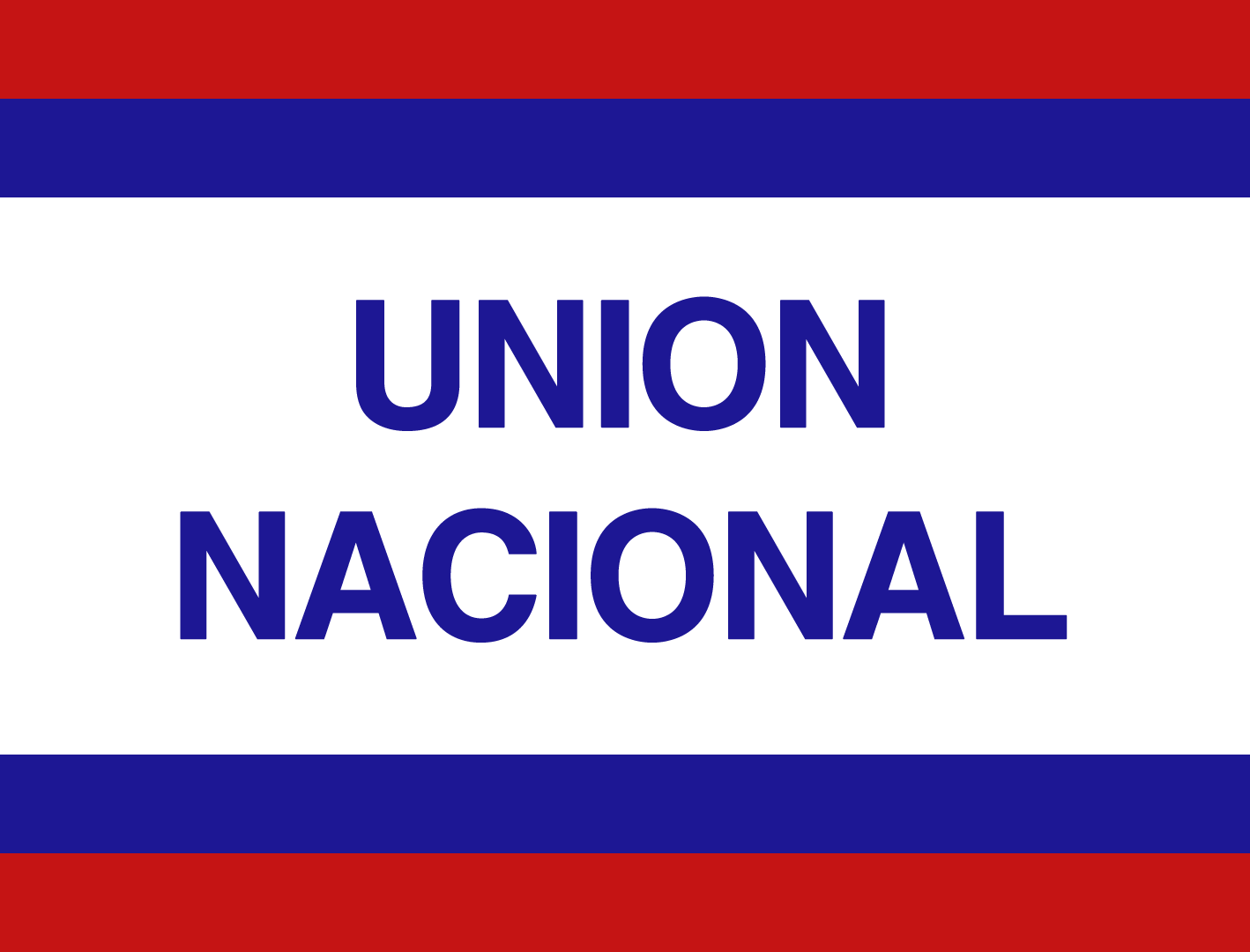 Emblema del Movimiento de Unión Nacional, agrupación política chilena existente entre 1983 y 1987